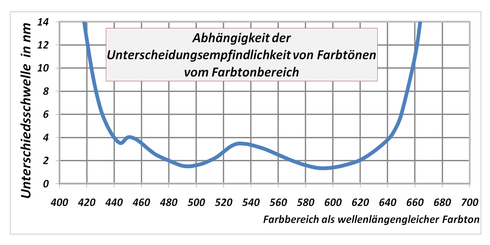 Abhängigkeit der Farbtonunterscheidung als Differenz benachbarter Farbtöne, als Funktion über den wellenlängengleichen Farbtönen des sichtbaren Spektrums. Nach Werten aus Karl Mütze, Leonhard Foitzik, Wolfgang Krug, Günter Schreiber: Brockhaus ABC der Optik. VEB F.A.Brockhaus Verlag, Leipzig 1961.